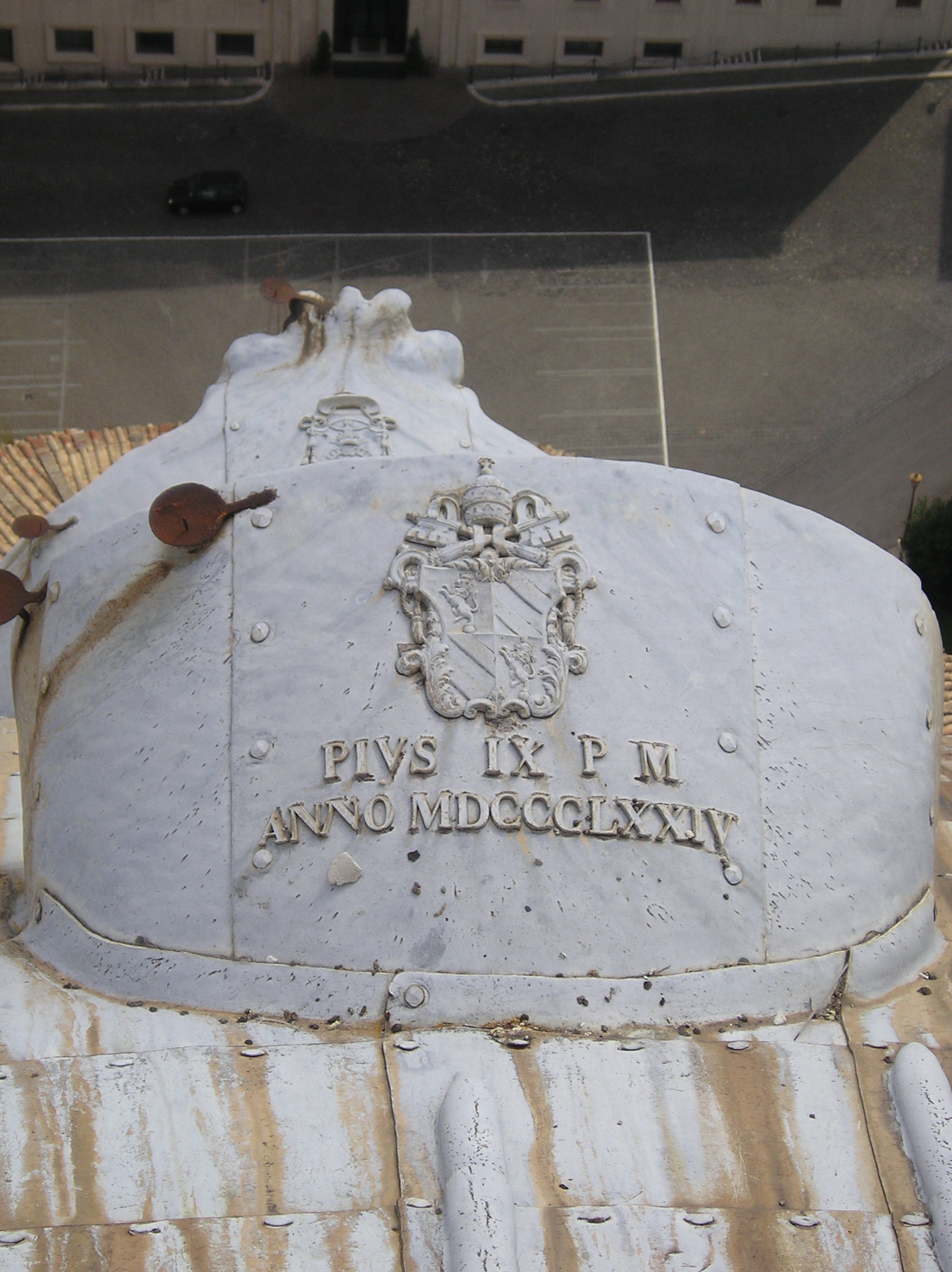 Stemma di papa Pio IX nella Basilica di San Pietro - dome